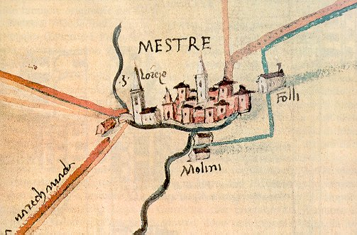 Mestre in una mappa del Cinquecento.